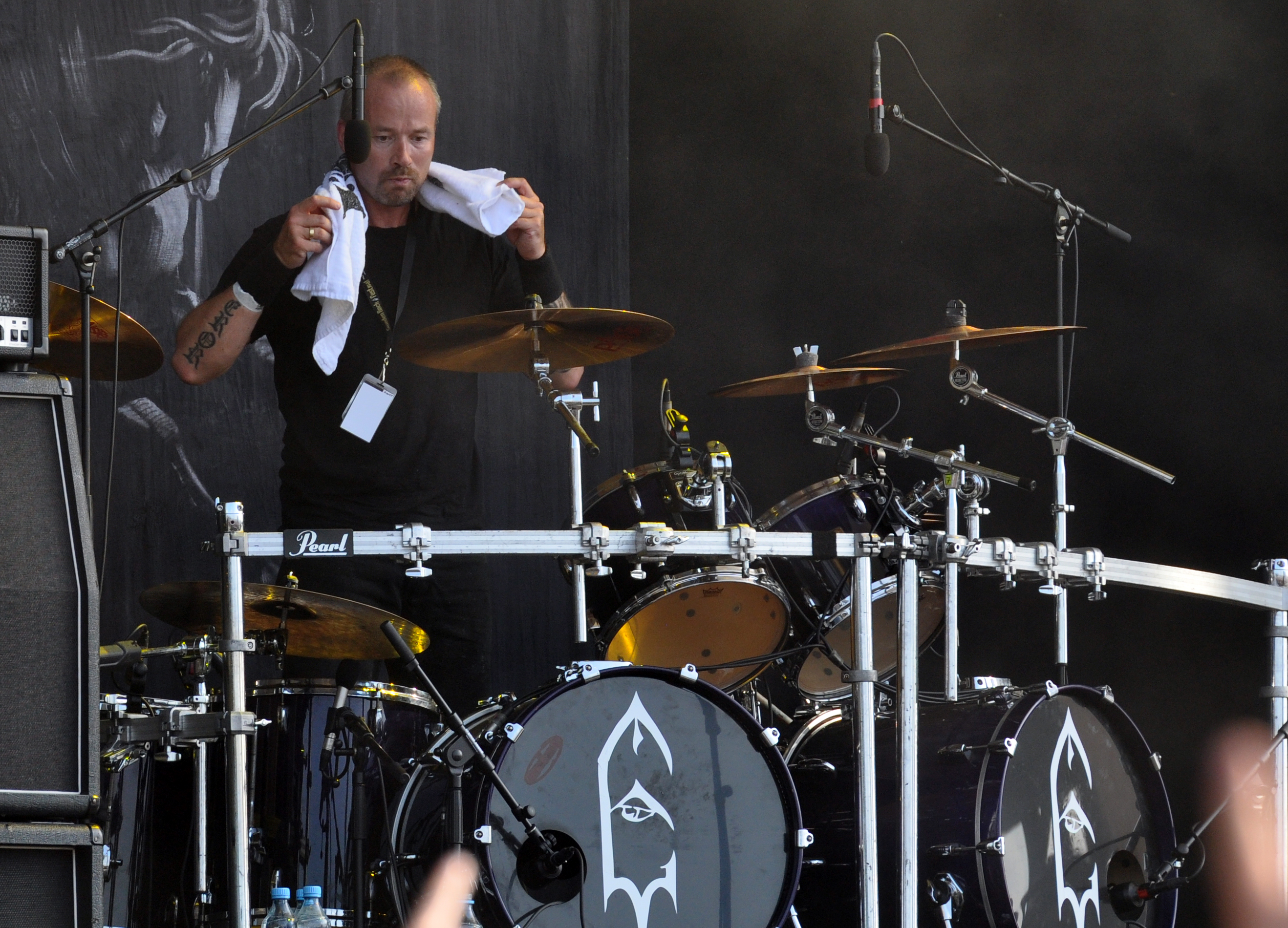 02-08-2014-Bård G. Eithun with Emperor at Wacken Open Air 2014-JonasR 04